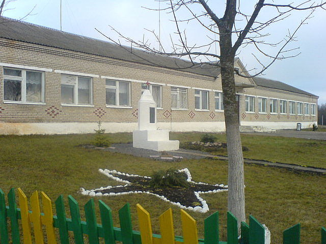 Лотвянская школа